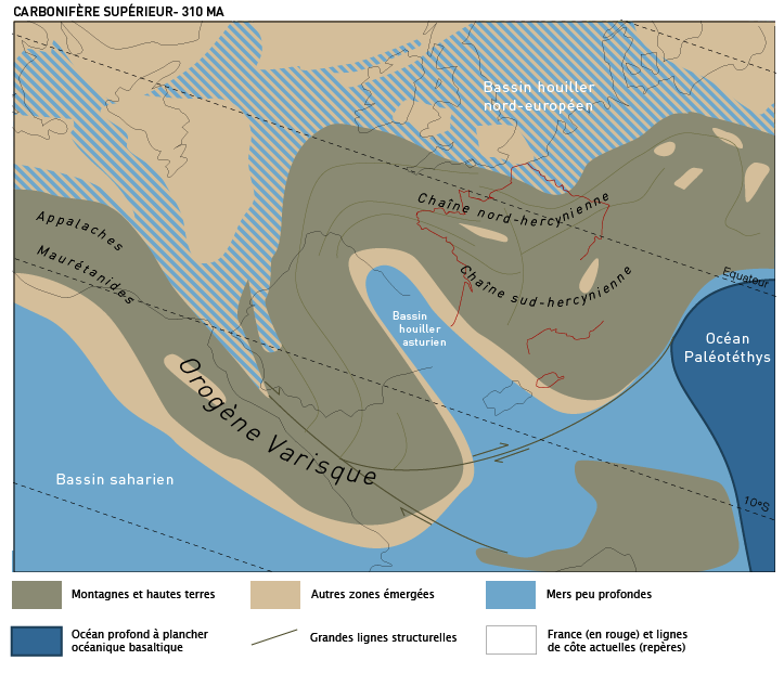 Reconstitution paléogéographique de l'Europe au Carbonifère supérieur. Paleogeographic reconstitution of Europe in the Pennsylvanian period.